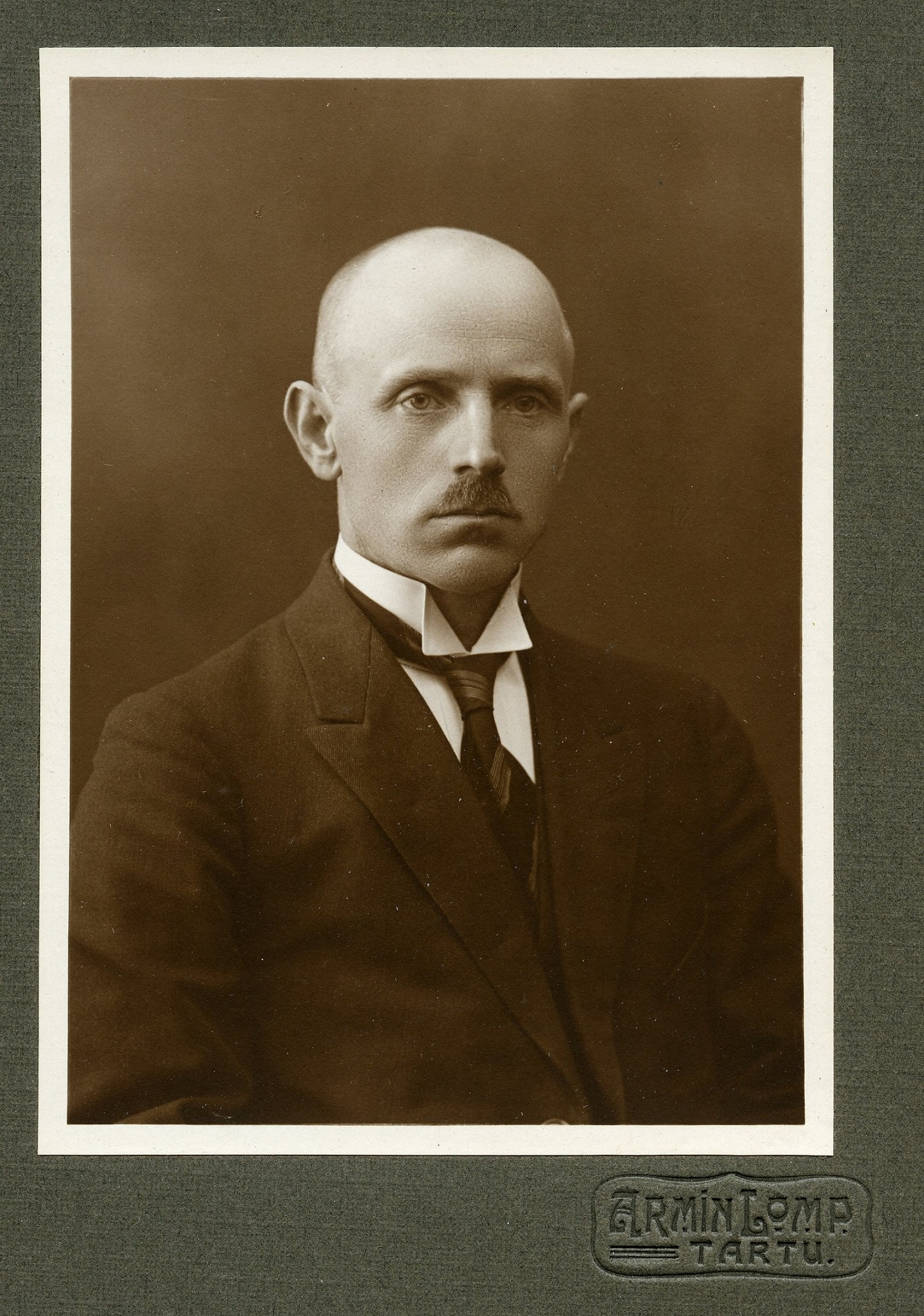 Karl Luik, Tartu linnapea. Fotograaf Armin Lomp, 1883–1936.